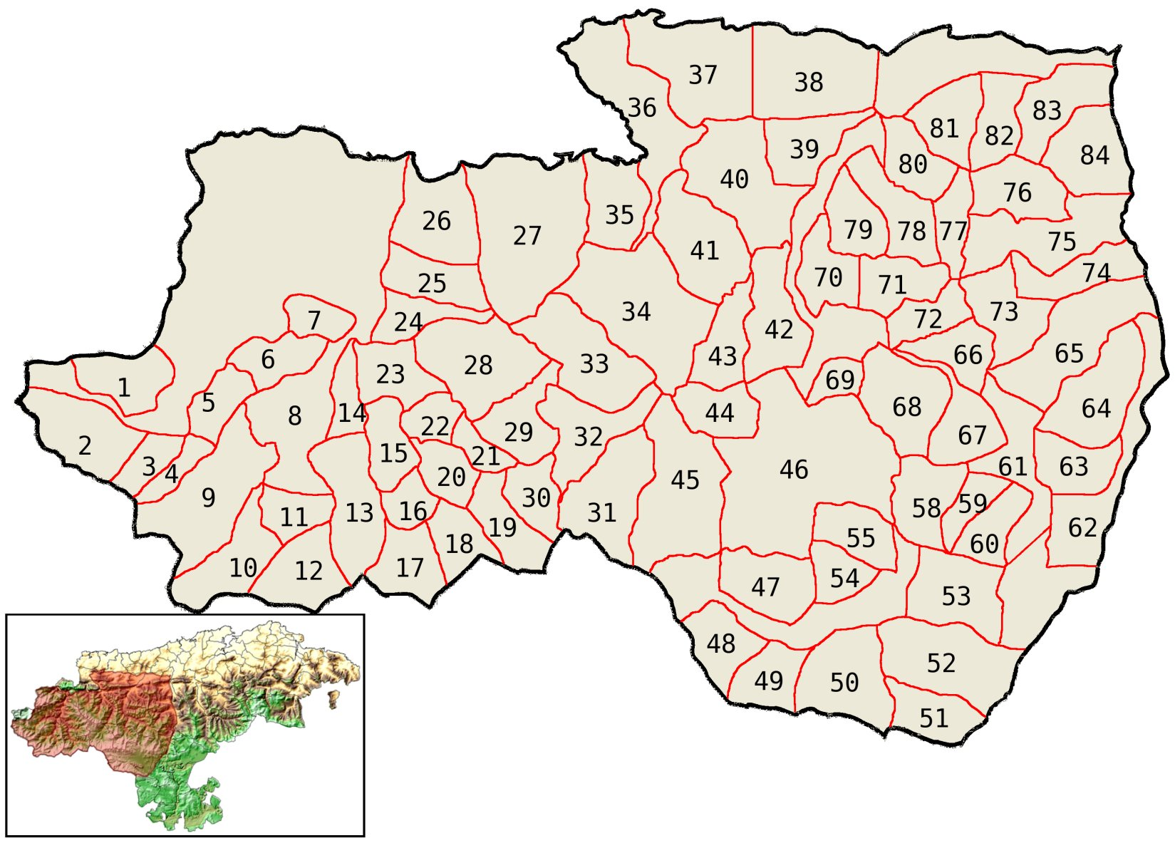 Mapa de la Reserva nacional de caza Saja con los montes de utilidad pública y situación. Cantabria (España)